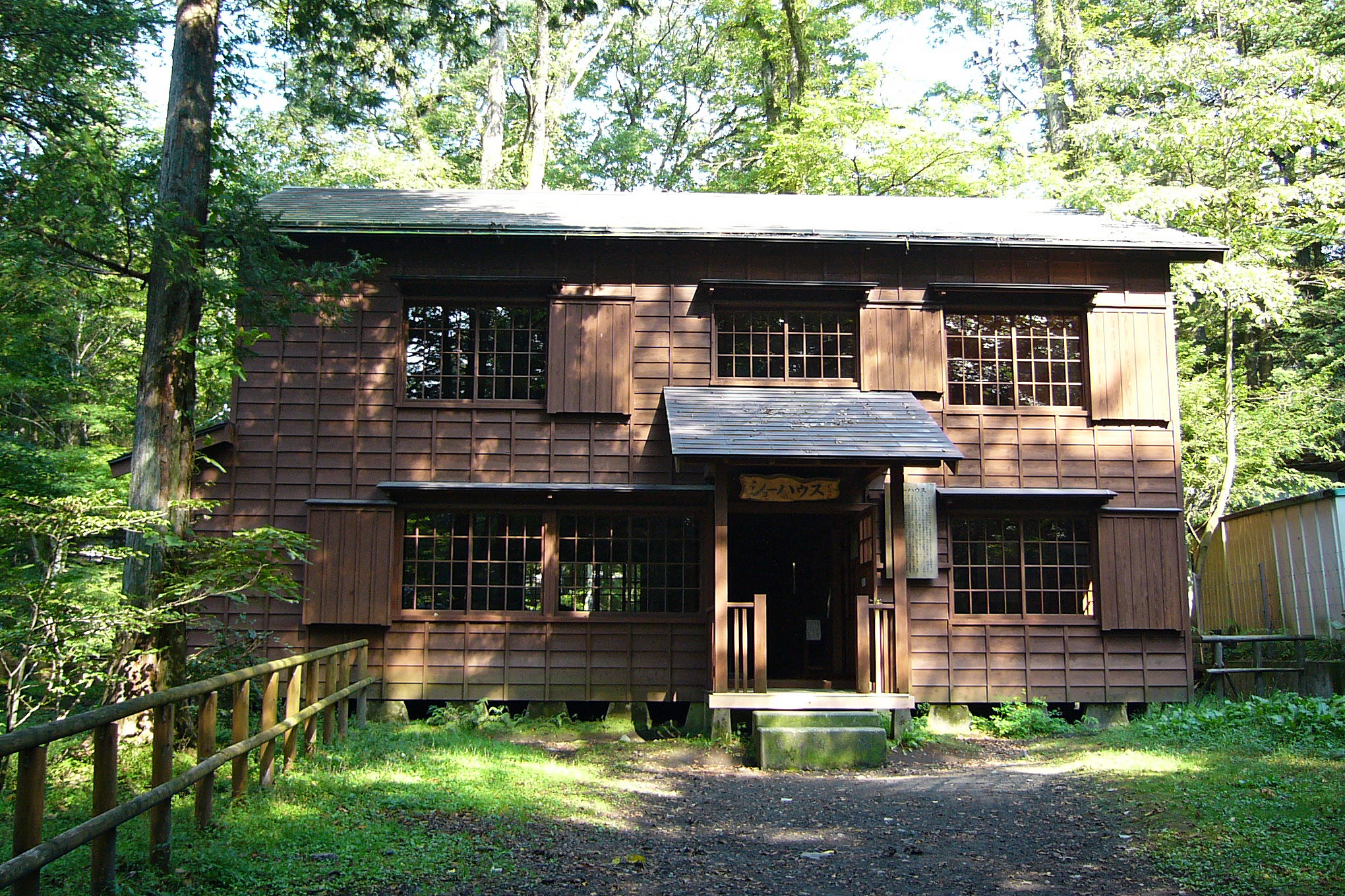 Shaw house in Karuizawa, Nagano, Japan